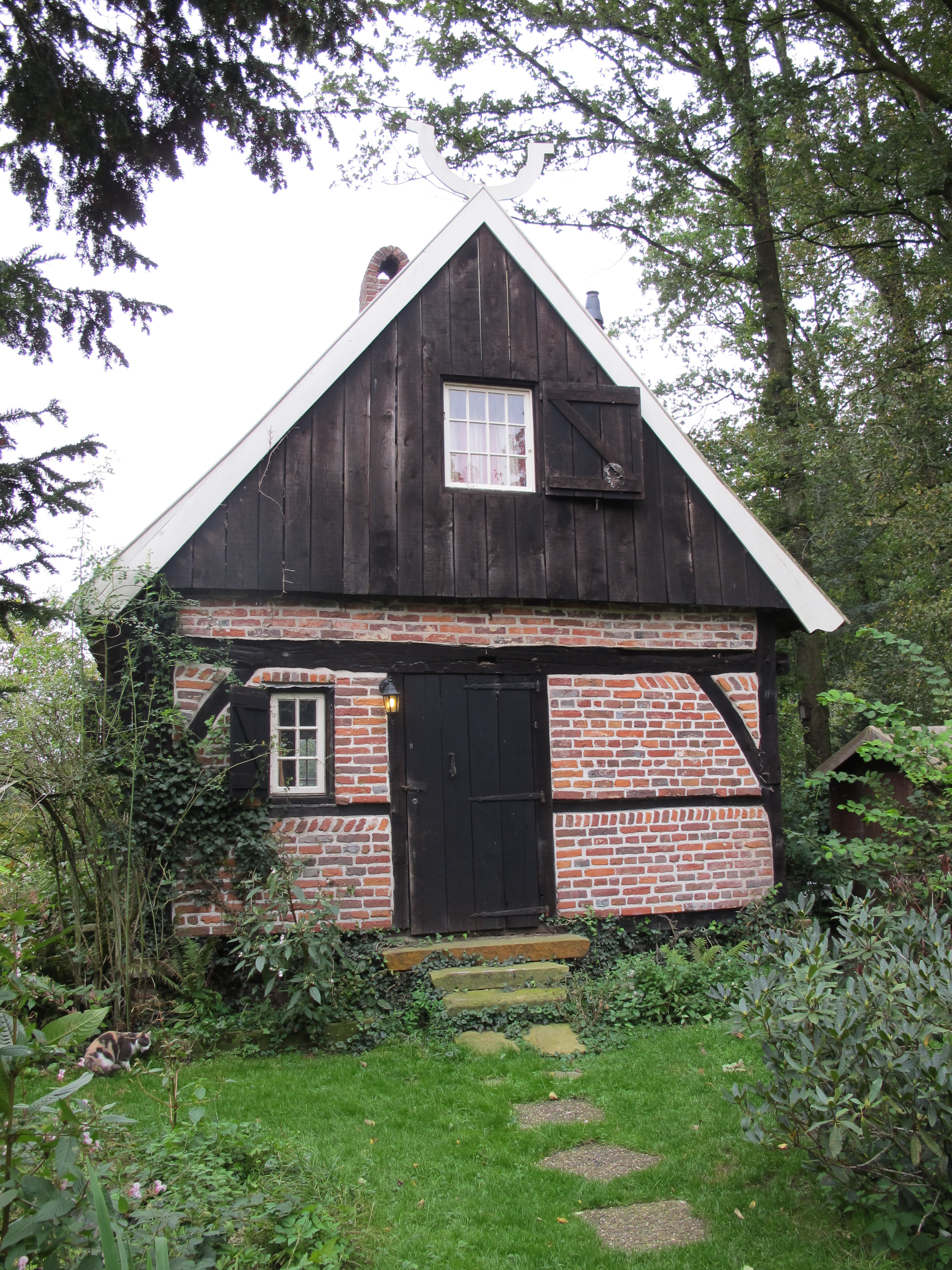 spieker bij de Meester Kok aan de Moezebrinkweg 2 in Winterswijk-Ratum